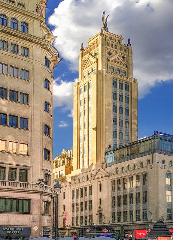 Edificio de la calle Virgen de los Peligros